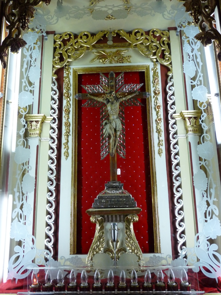 El Señor de los Milagros de San Pedro, es una escultura de Cristo en la cruz ubicada en el Altar Mayor de la Basílica Menor del Señor de los Milagros ubicada en el municipio de San Pedro de los Milagros en el departamento de Antioquia (Colombia).